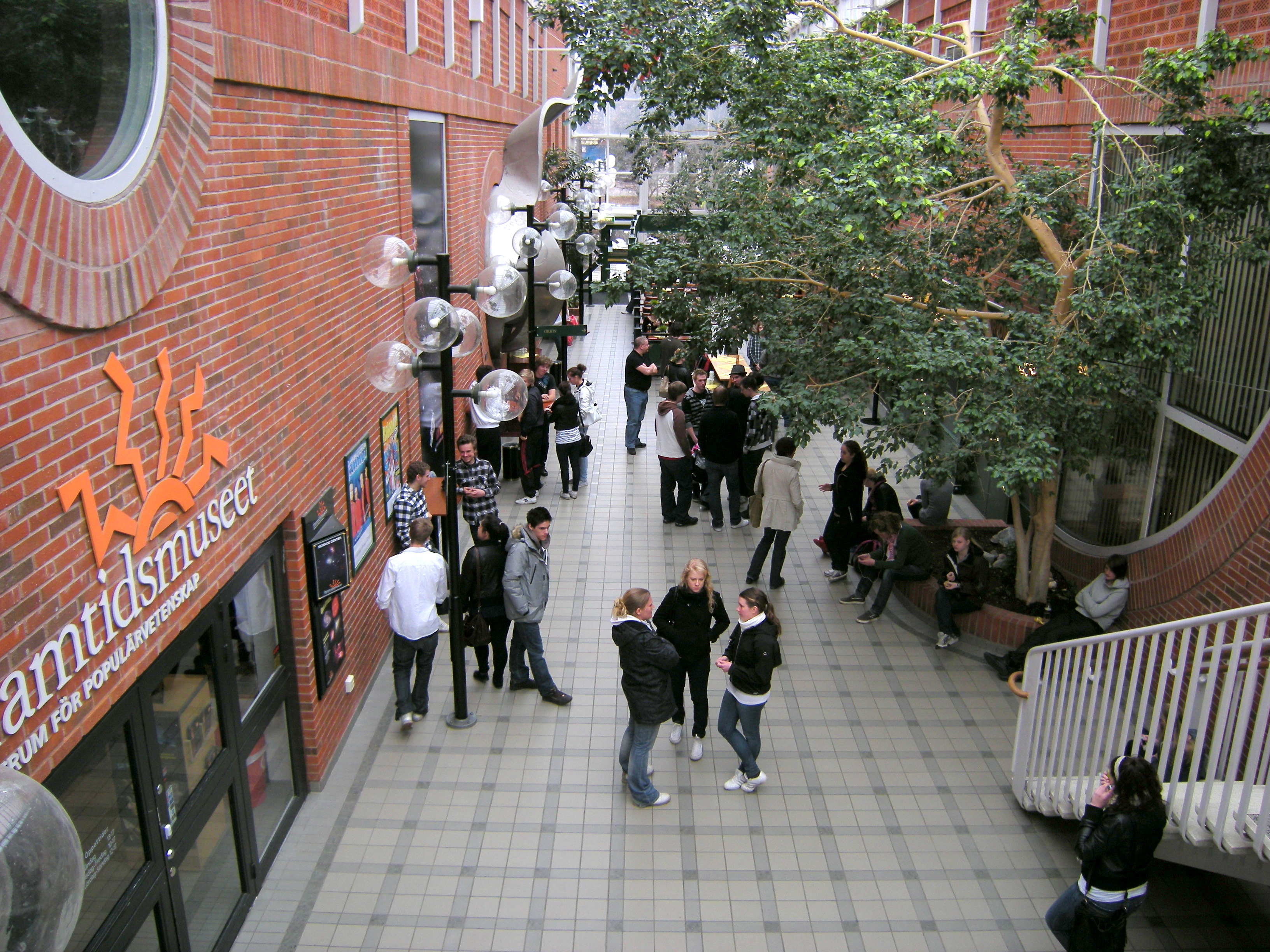 Borlänge Folkets hus, inne.